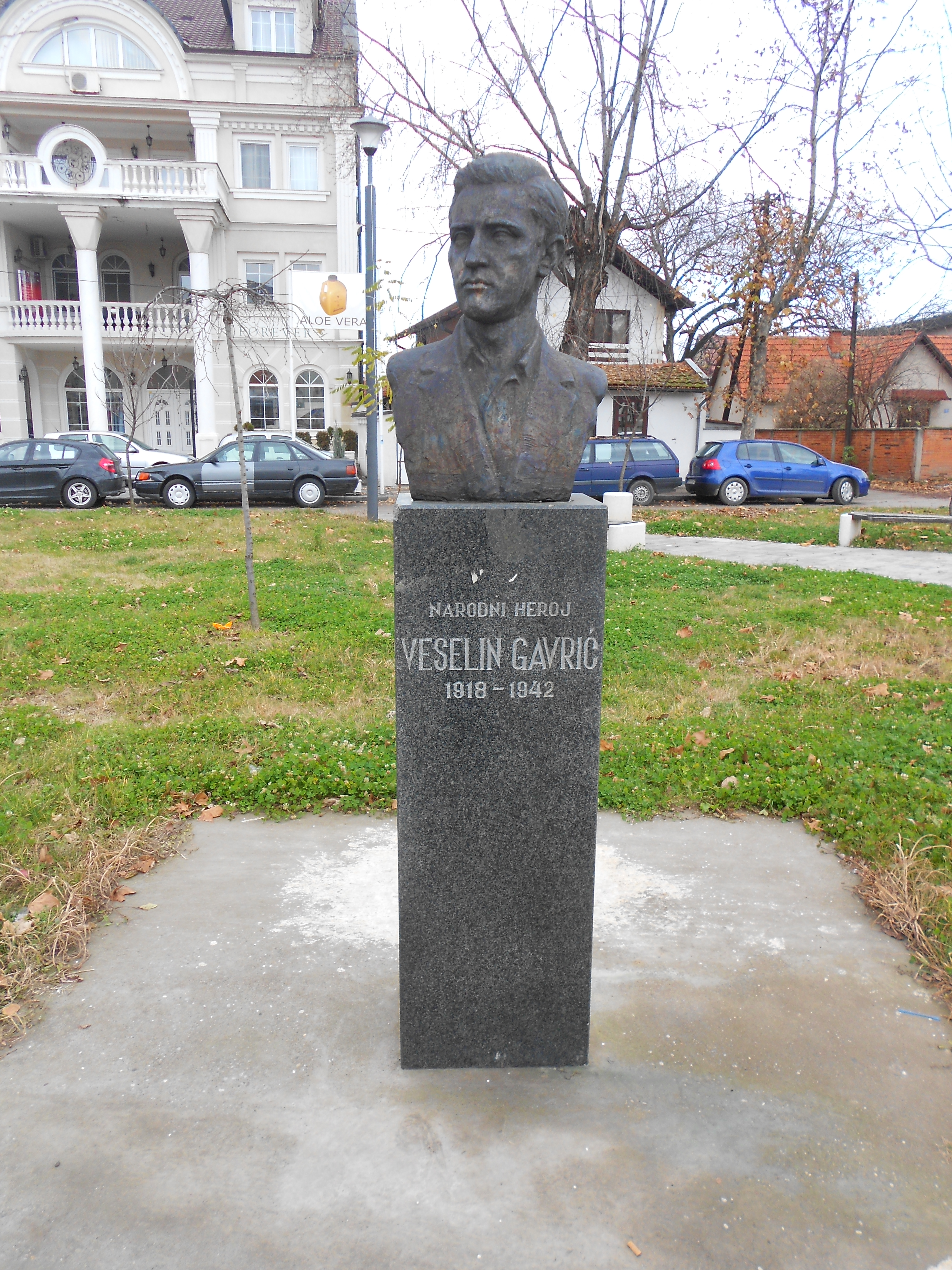 Споменик Веселину Гаврићу у Бијељини